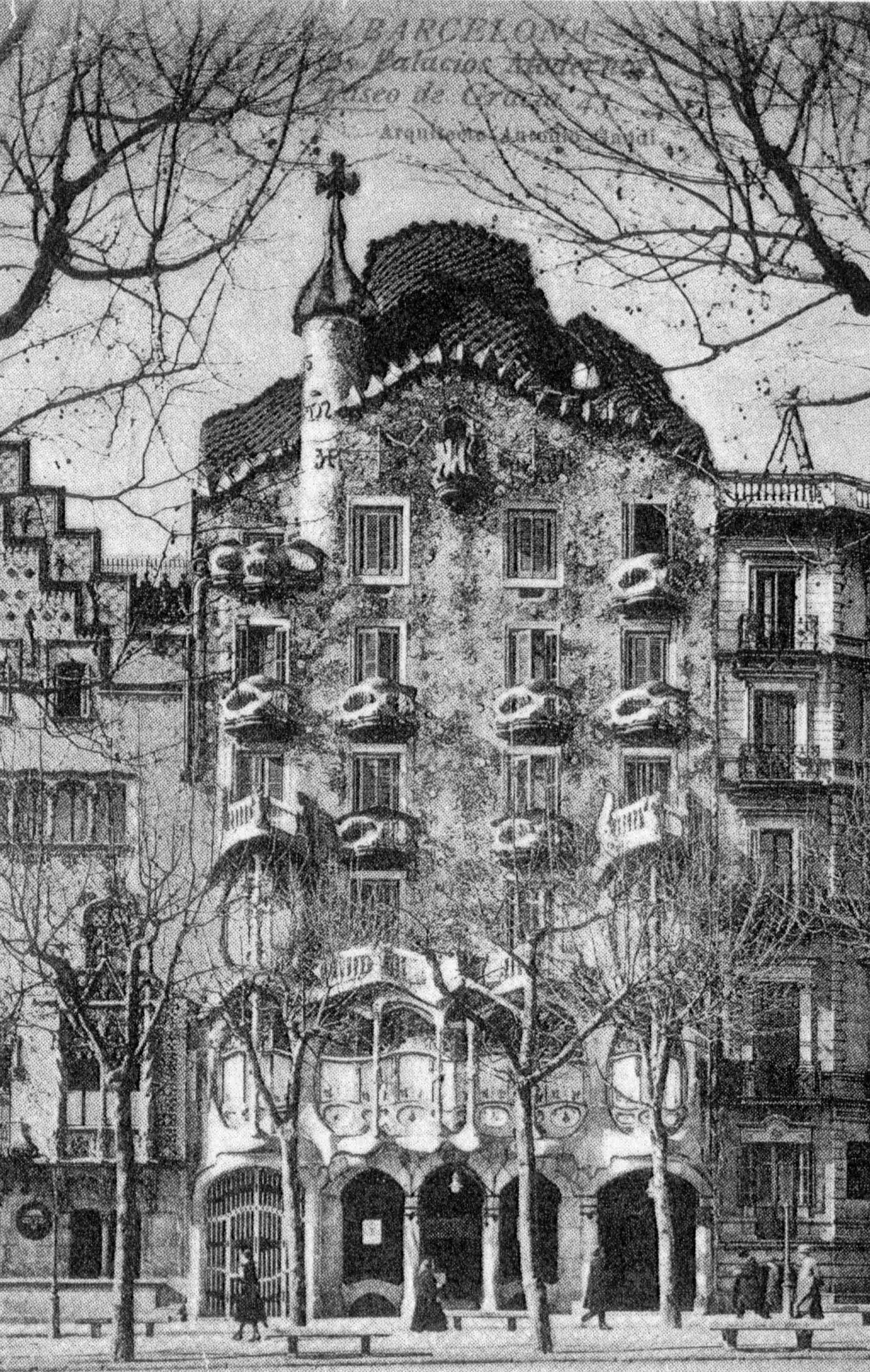 Façana casa Batlló poc després de la seva construcció (905-1907)